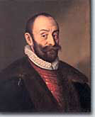 Hans Fugger (1531–1598, gemalt 1590 von Hans von Aachen) Foto H. Müller Fuggermuseum Babenhausen